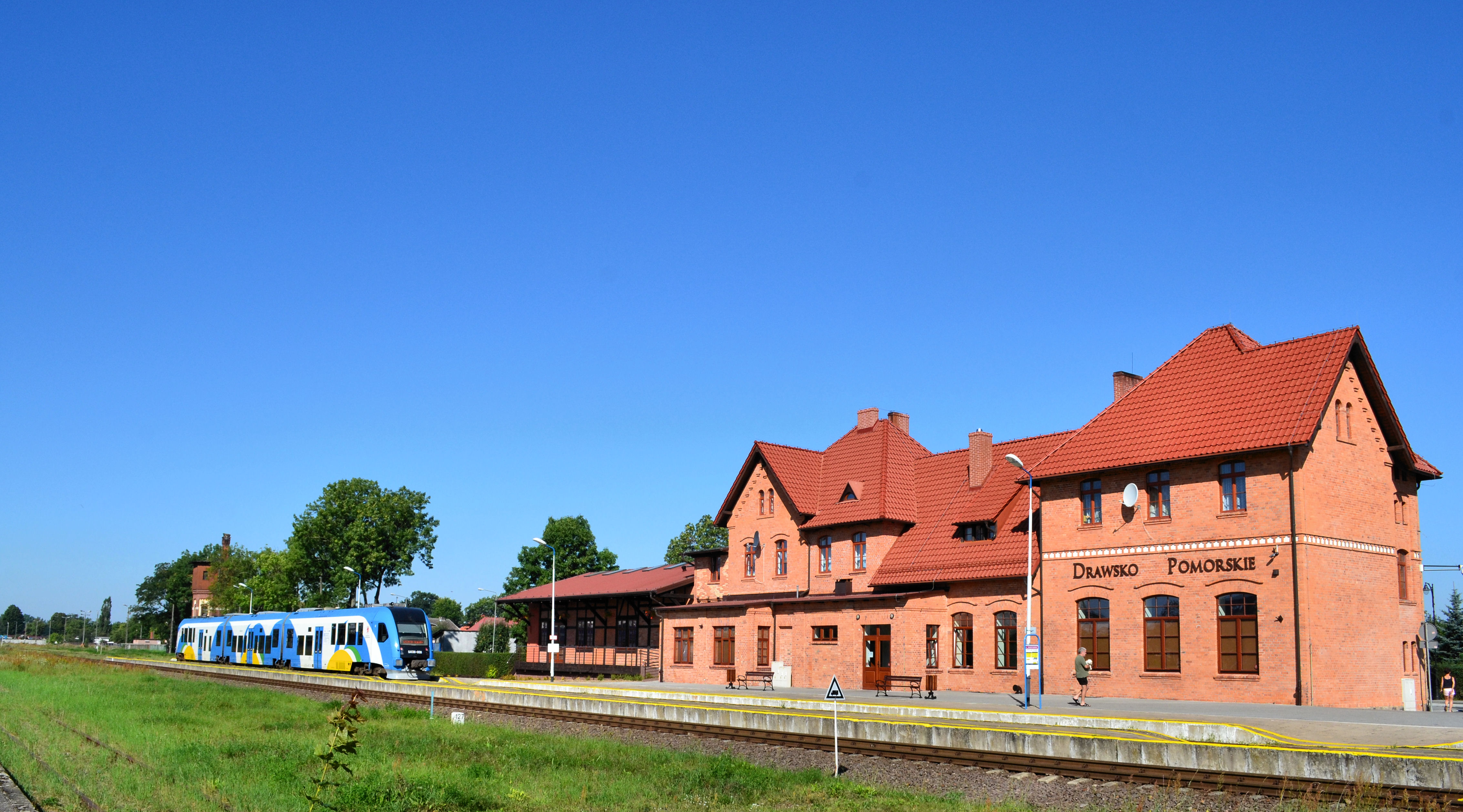 Stacja kolejowa w Drawsku Pomorskim